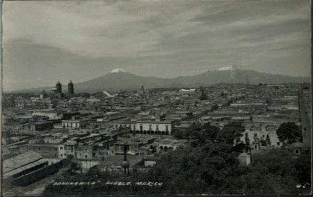 Fotografía de la ciudad de Puebla desde el barrio del Alto